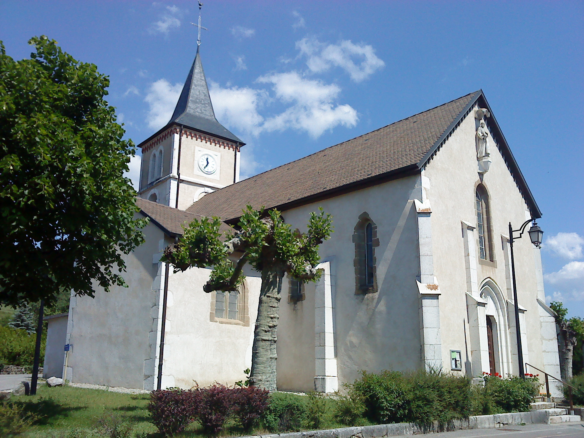 Eglise Saint-Benoît de Grilly, Ain, France